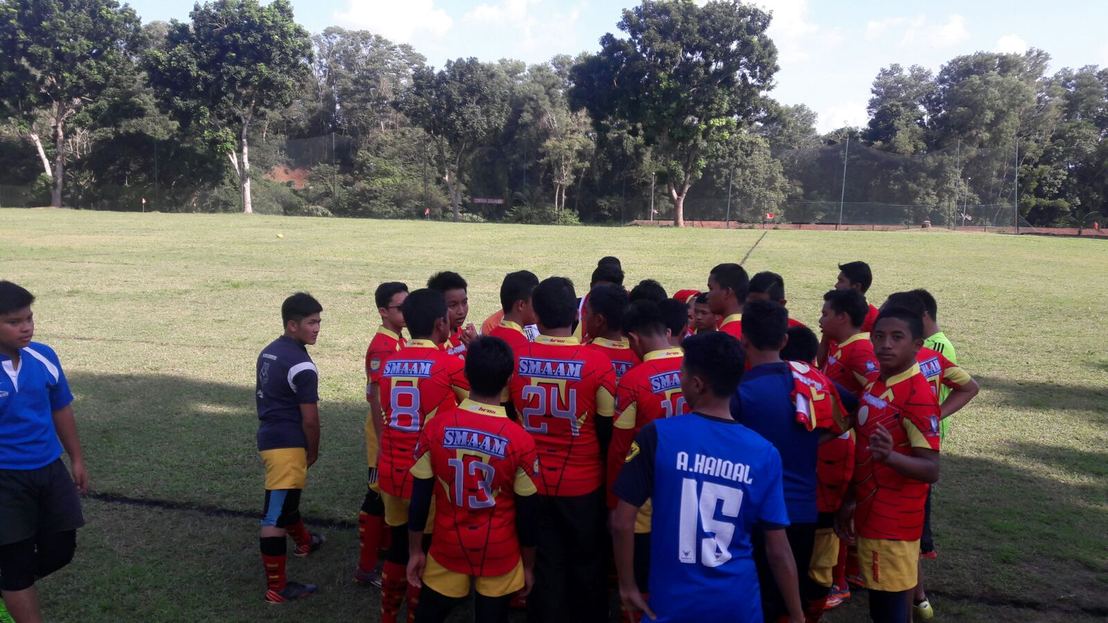 Kemampuan pasukan rugby yang boleh dibanggakan pada tahun 2016